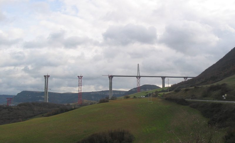 Le viaduc de Millau en construction, partie sud (côté Creissels), début 2004.